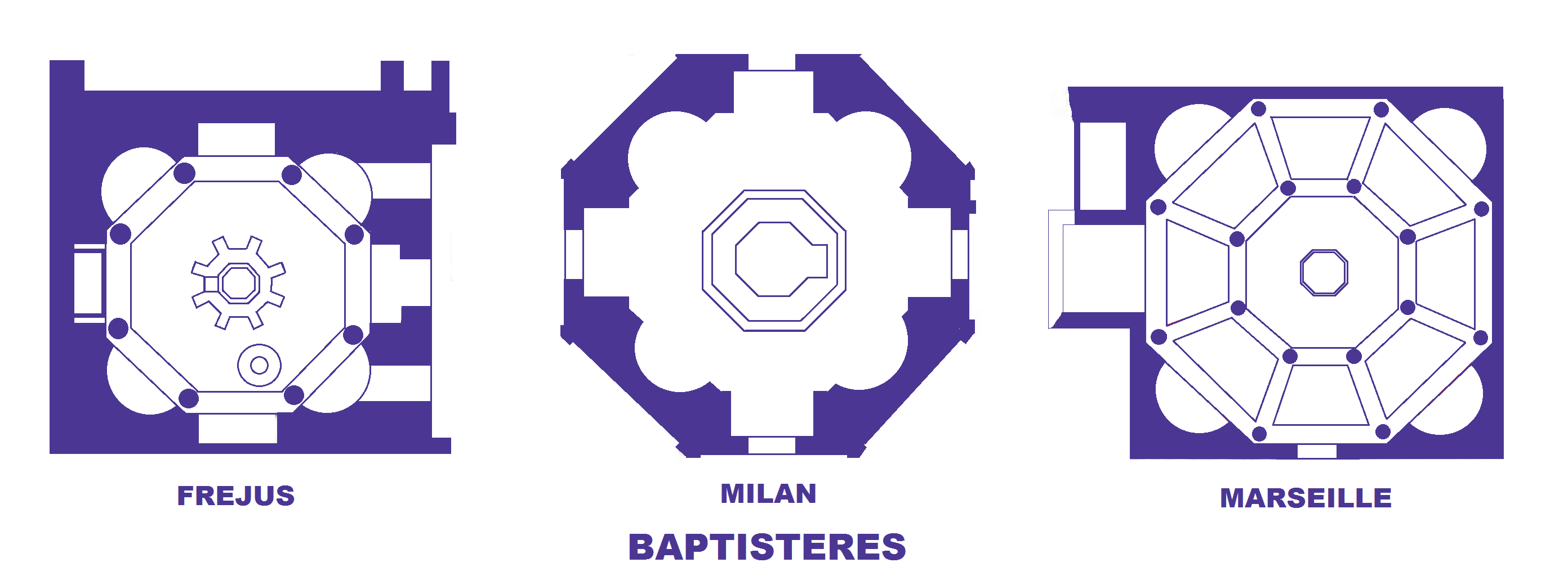 Baptistères, plans de Fréjus, Milan, Marseille